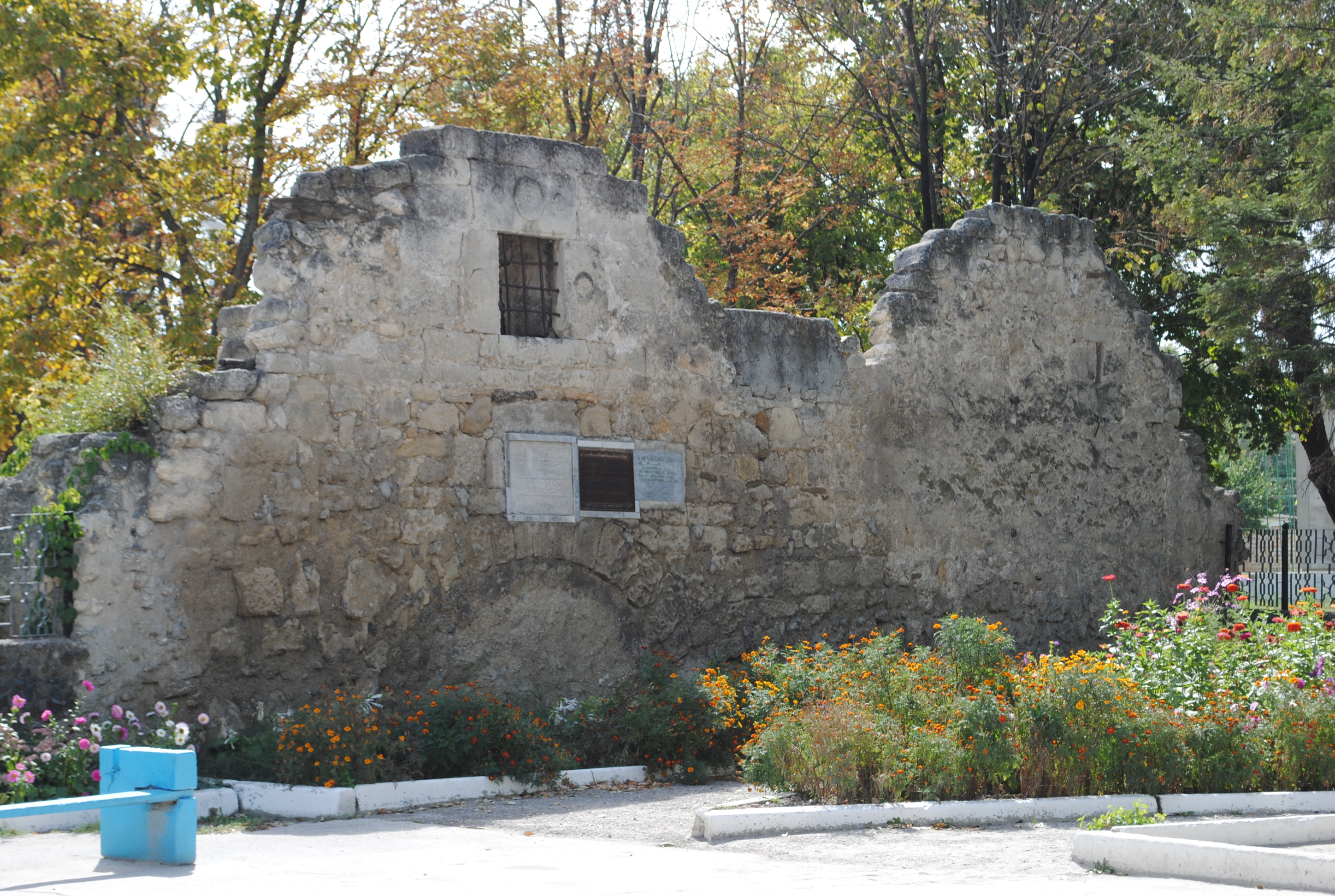 караван-сарай Таш-Хан XIII-XVI ст._Білогірськ